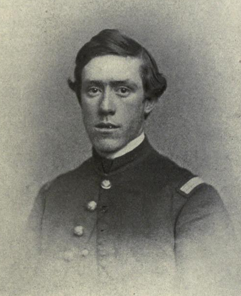 Elliott Coues aged 21